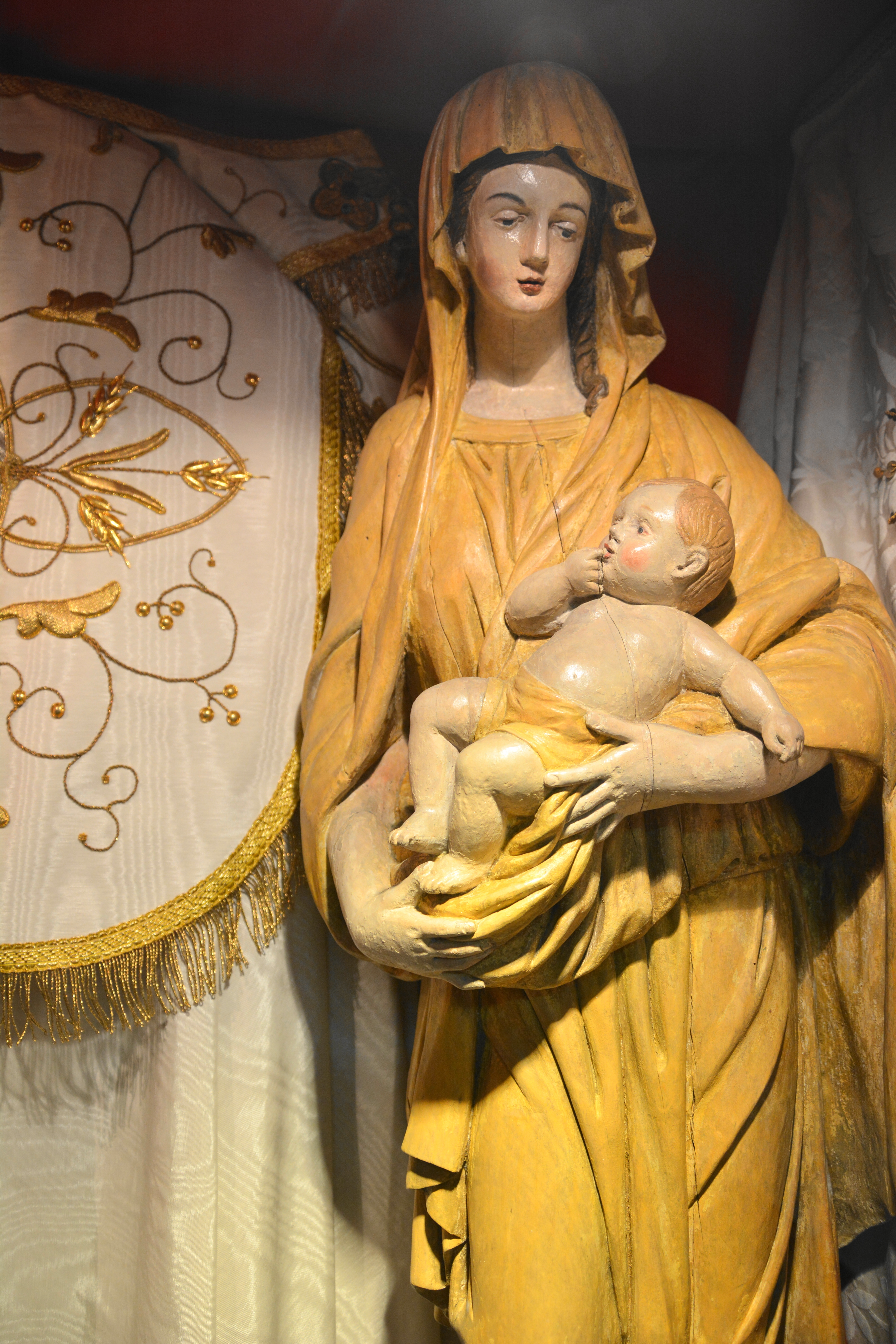 Bois polychrome du XIVéme siècle - restauré en 1998.